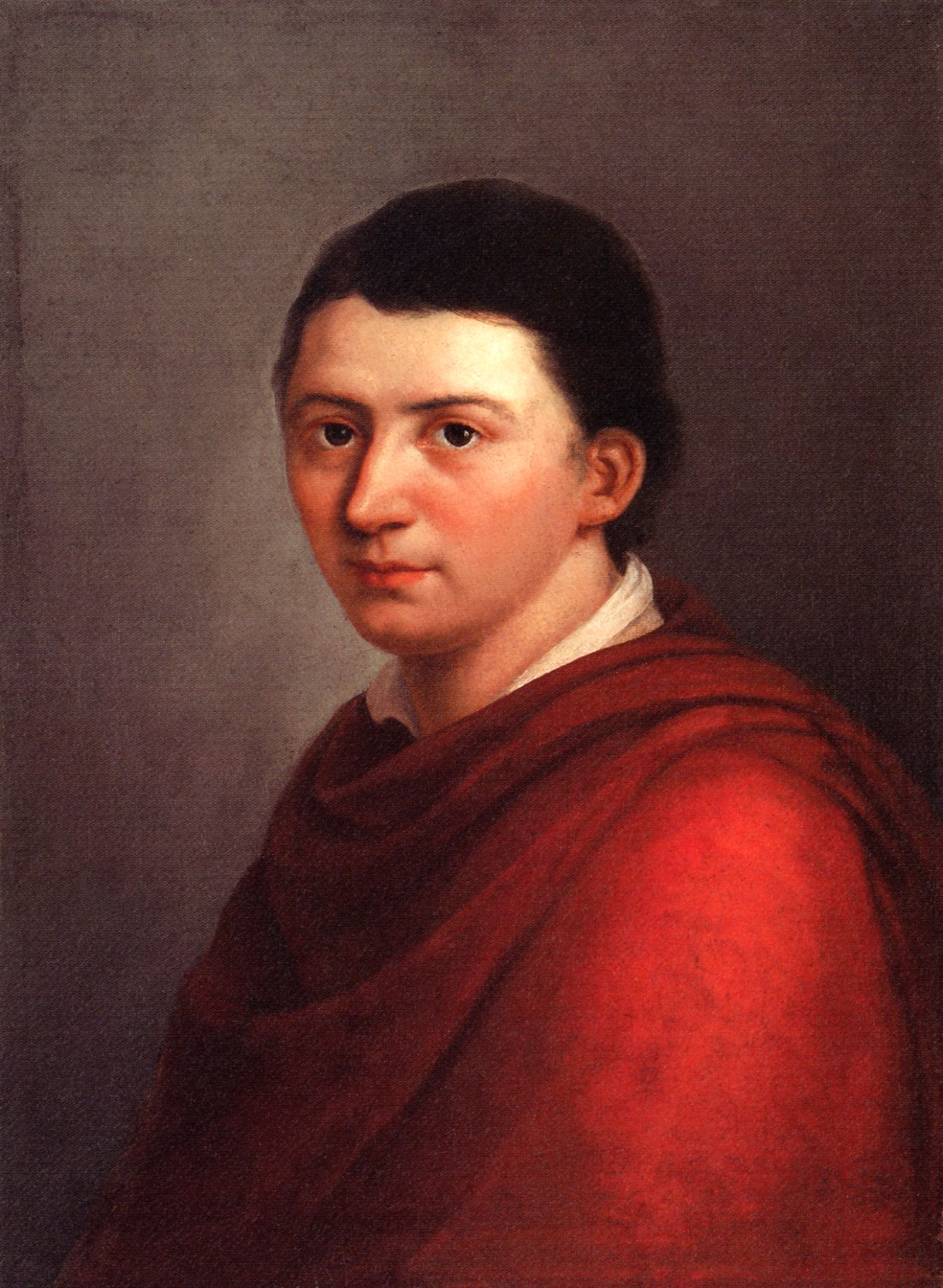 Portrait Friedrich Schlegel